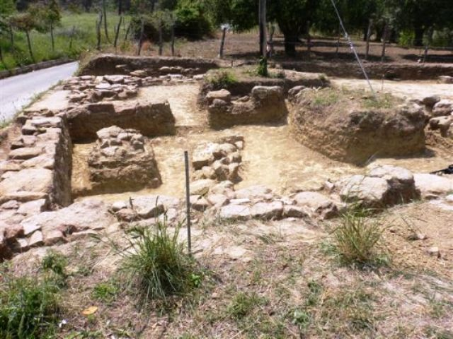 Località Lustra - Presumibile Villa Greco-Romana, IV secolo a.C.